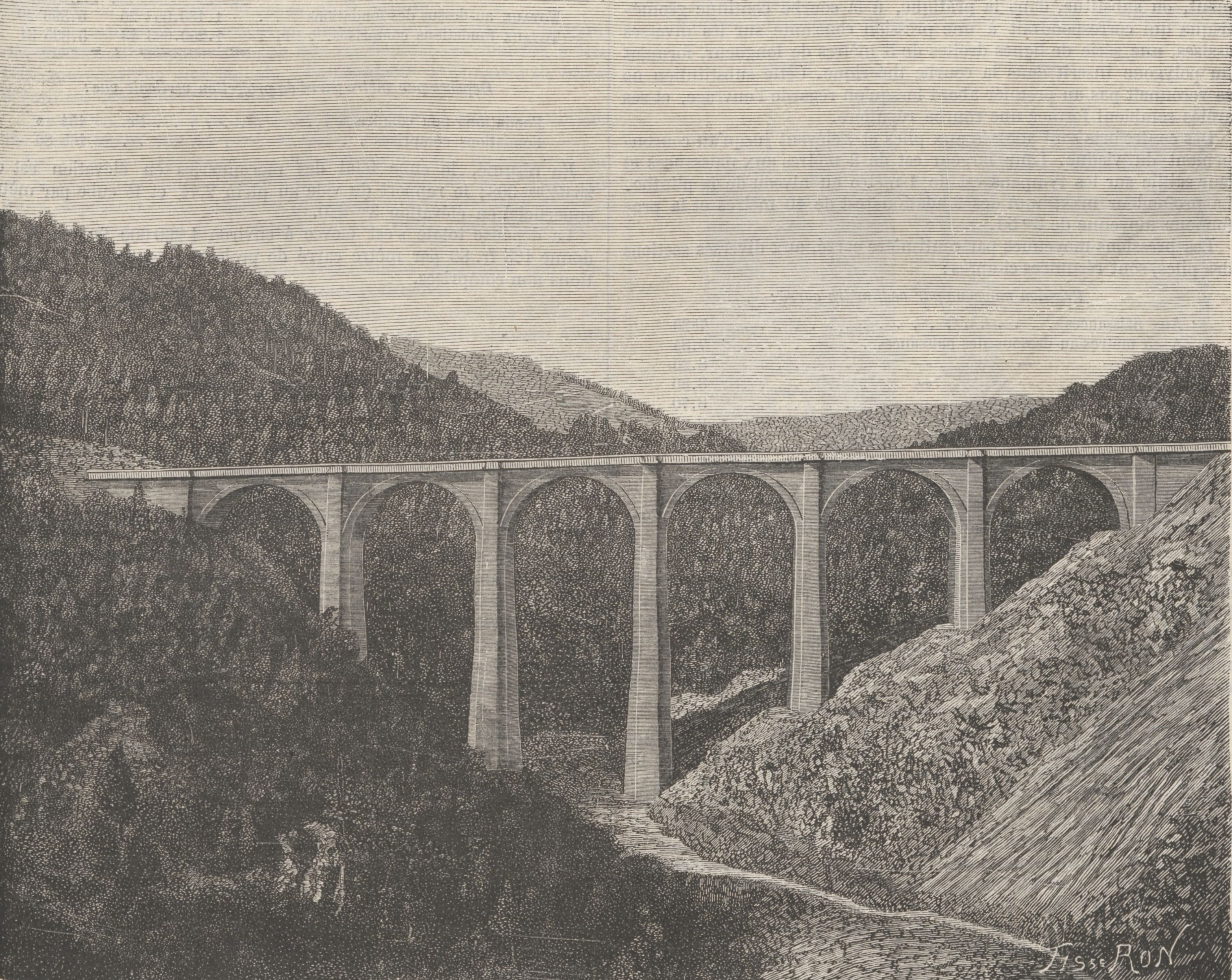 Gravure du viaduc de la Crueize sur la ligne du chemin de fer de Marjevols à Neussargues de la compagnie du Midi.